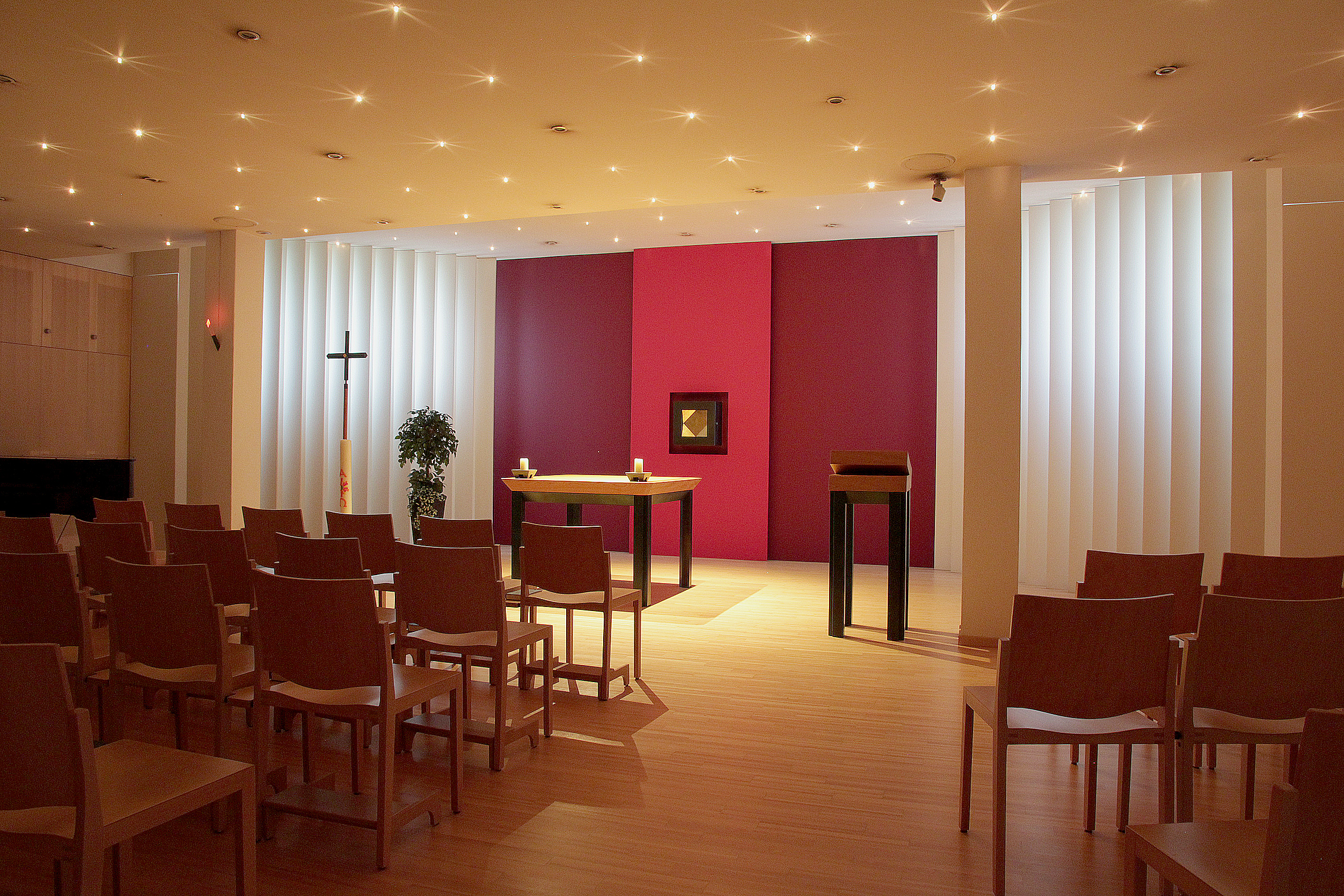 Römisch-katholische Pfarrkirche Maria Frieden Dübendorf, Altarraum der Krypta von Josef Caminada, Zürich